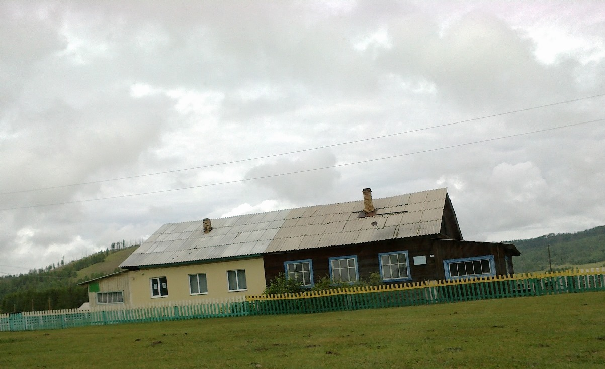 Библиотека (слева) и фельдшерский пункт (справа)